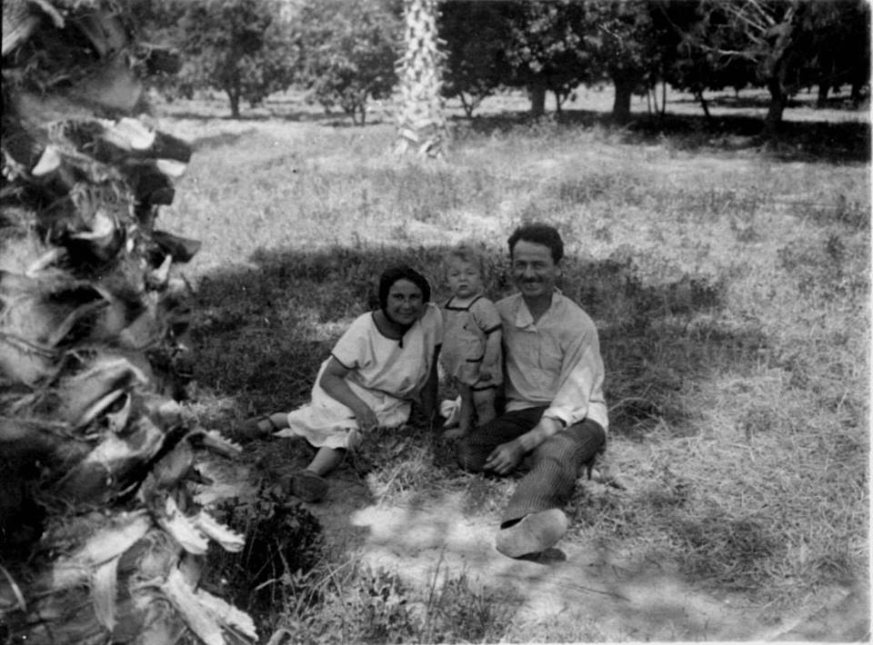 Miriam Singer 2